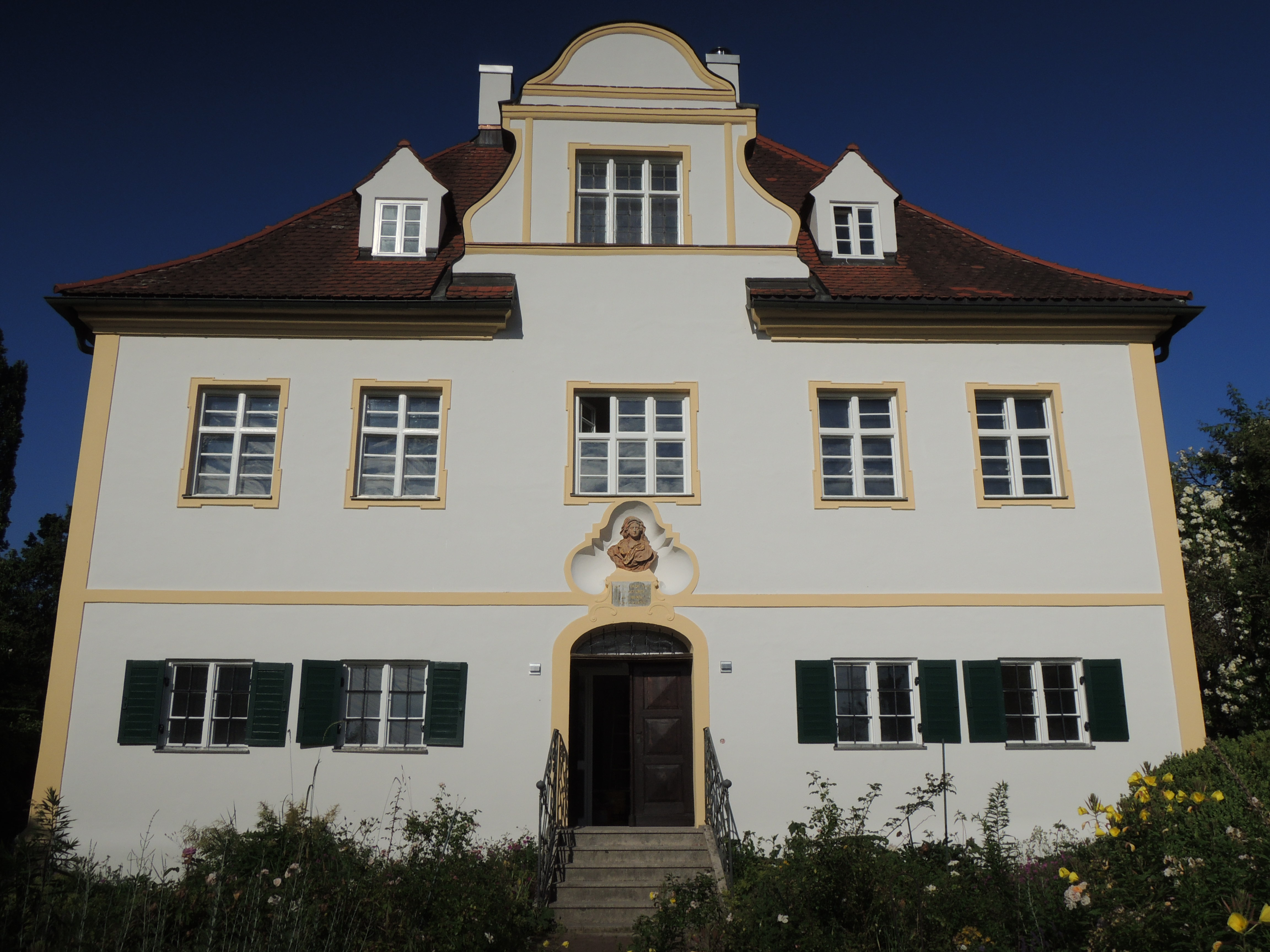 Bayerisches Baudenkmal, Bergstraße 3a in Leitershofen, Ortsteil von Stadtbergen